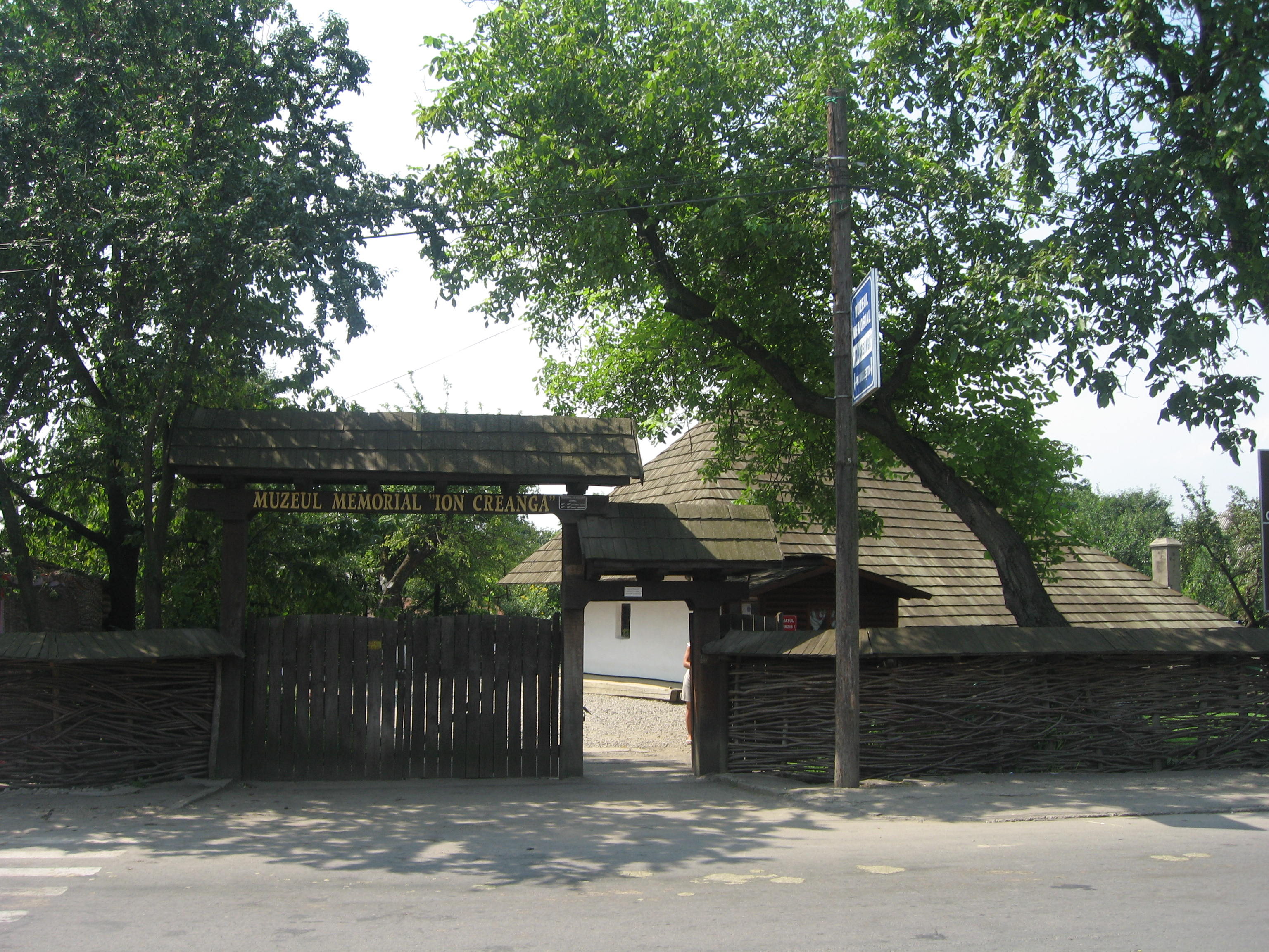 Casa memoriala Ion Creanga din Humulesti